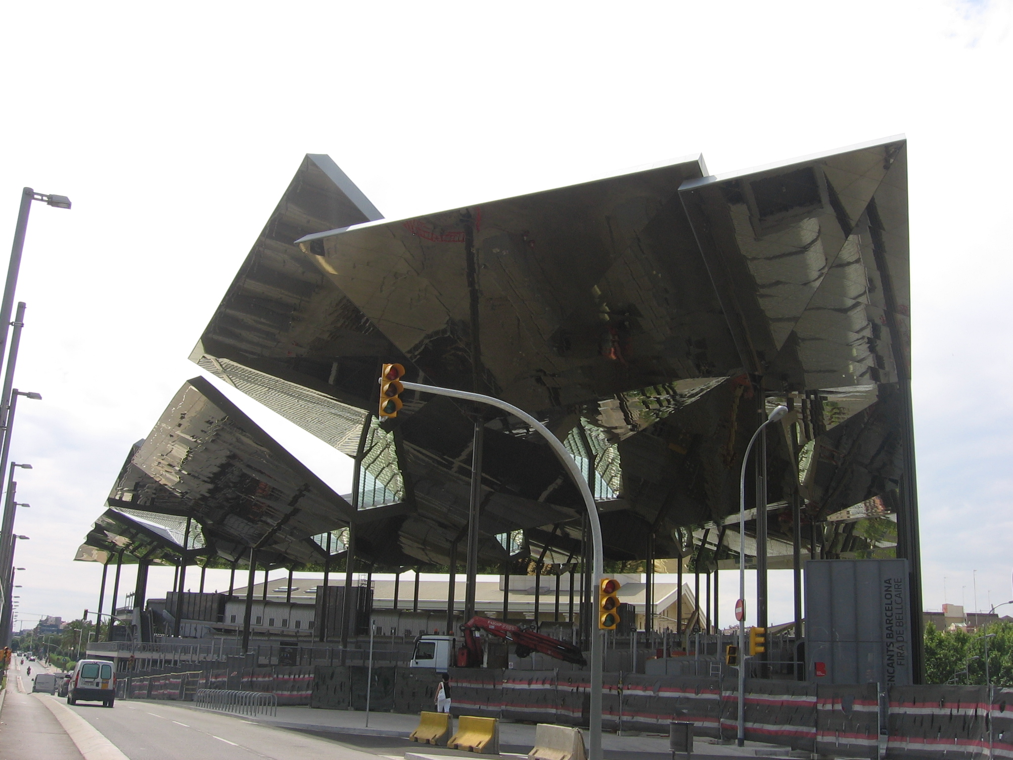 Encantes Nuevos de Barcelona, Plaza de las Glorias Catalanas.